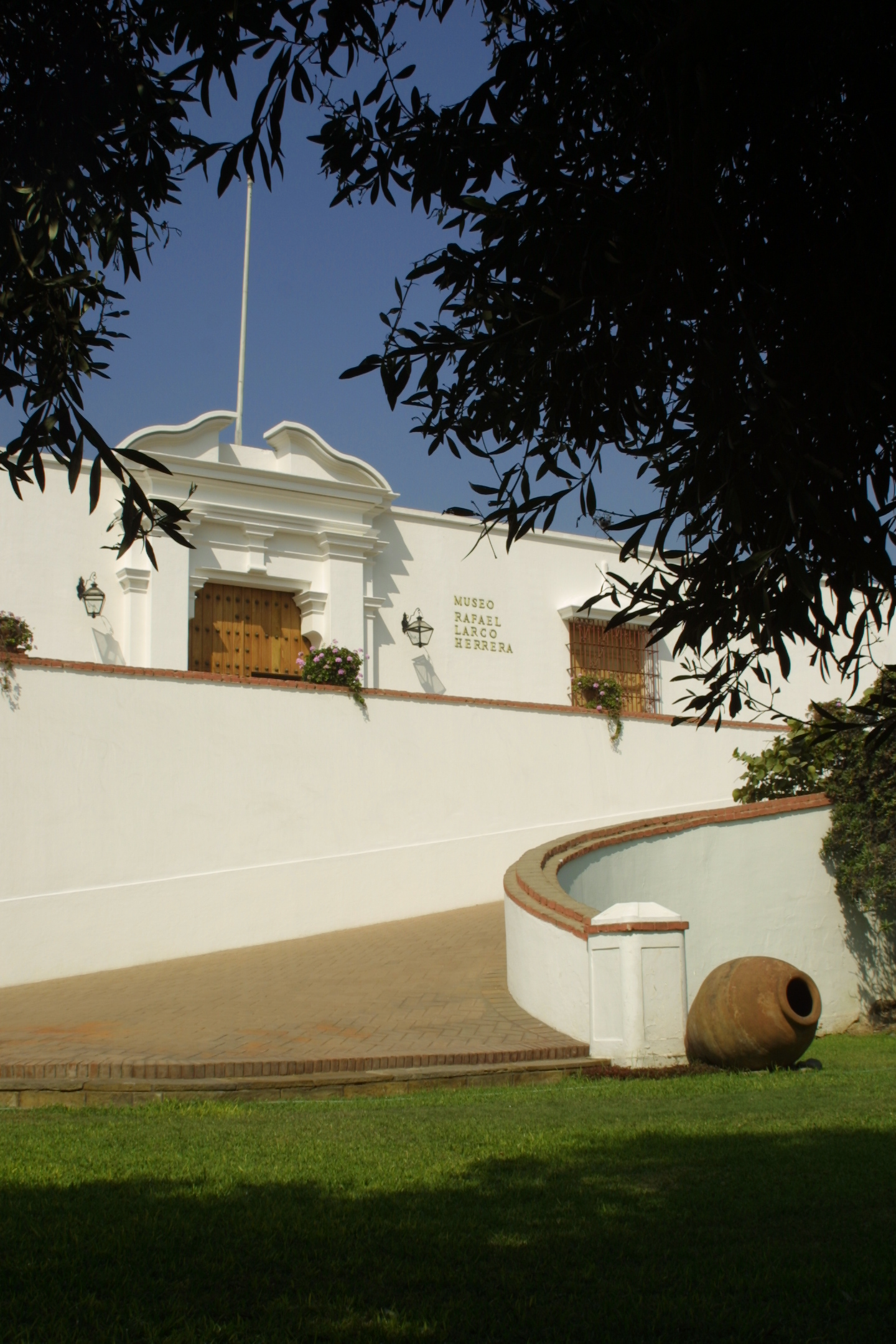 fachada museo larco